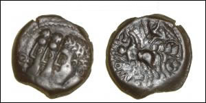 Photo avers - revers de la monnaie Remes LT.8040. avers (REMO) : Trois bustes d'hommes de profil gauche, entouré de grènetis (points constituant un cercle périphérique près la bordure circulaire de la pièce). revers (REMO) : Bige à gauche avec un aurige ailé tenant un fouet monté dans le char. Cette monnaie assez répandue a coexisté avec les monnaies romaines. Auteur : photo d'un objet appartenant au publiant (GBlerot).